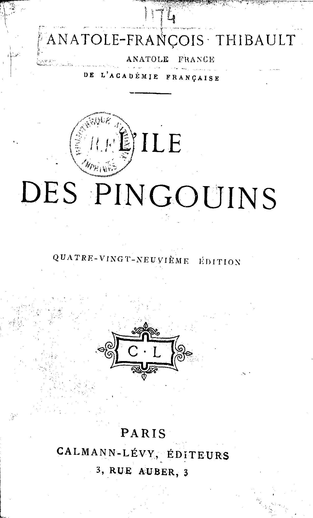 Anatole France, L'Ile des Pingouins, 89e edition, Paris, 1909.